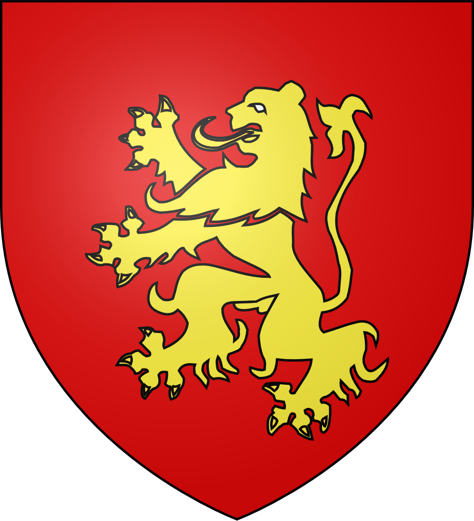 Blason de la ville d'Ansouis (Vaucluse) : De gueules au lion d'or